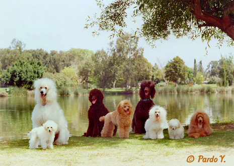 כל גודלי הפודל. צילום: יגאל פרדו